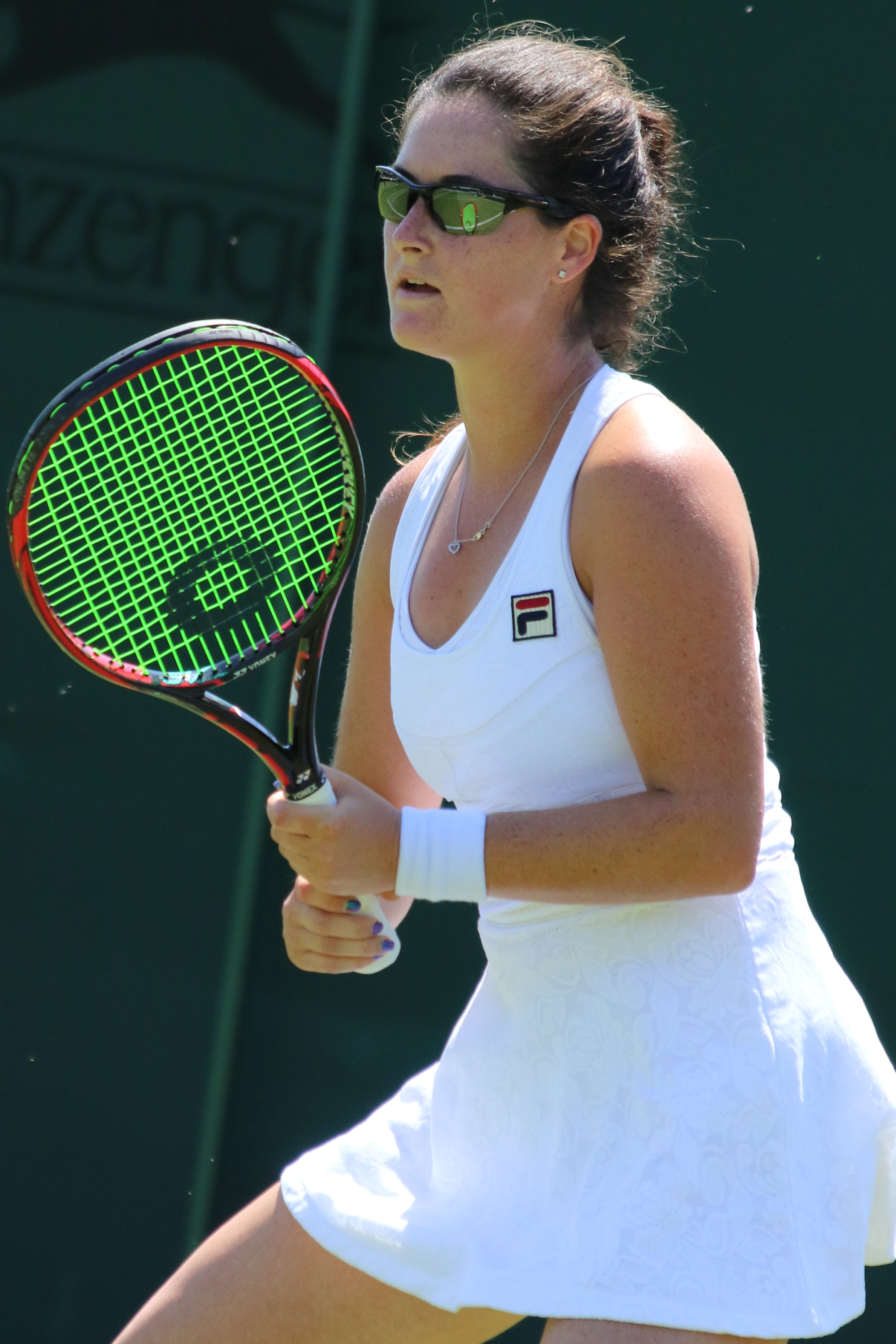 Loeb WMQ18 (18)